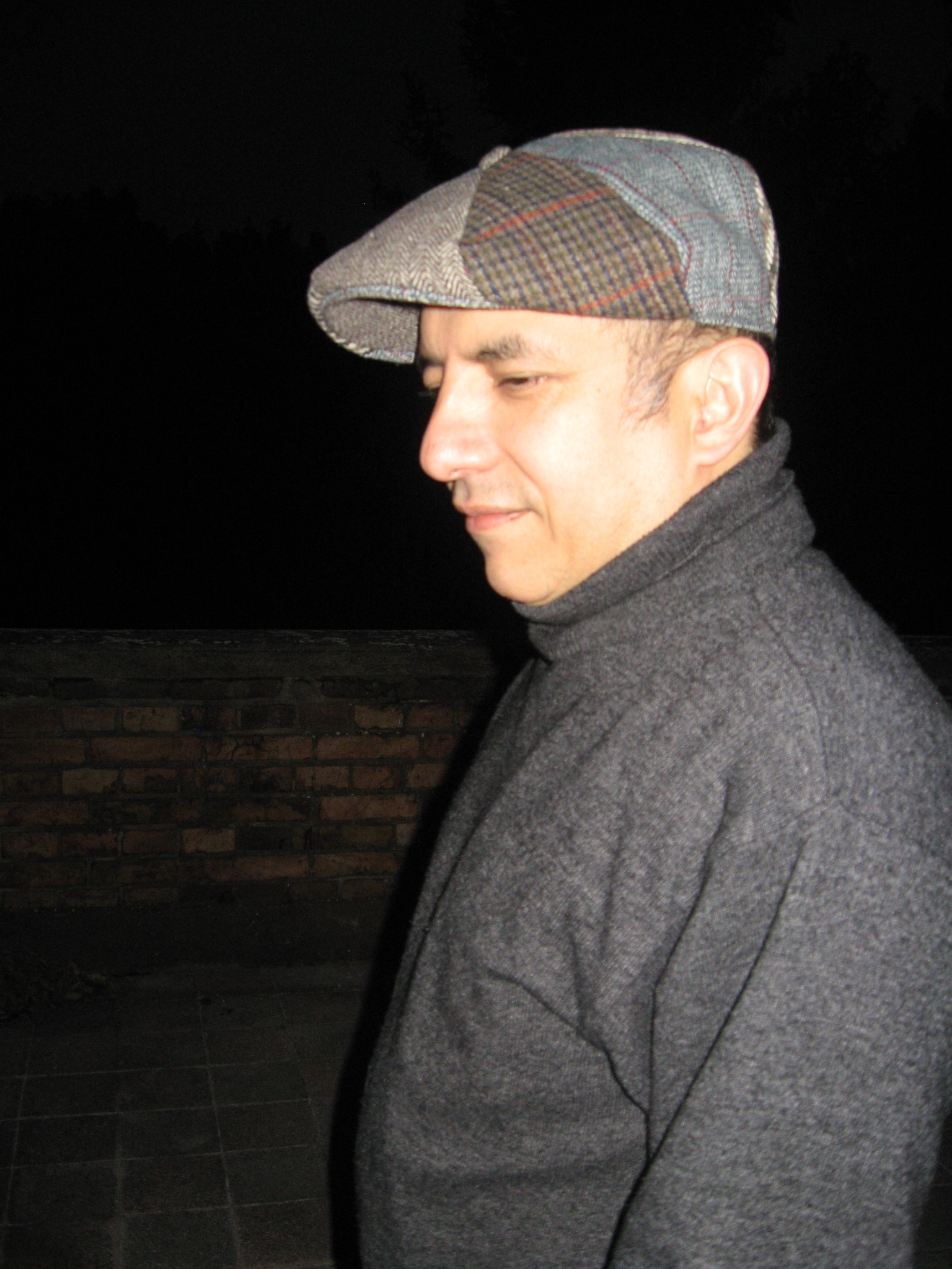 Foto de perfil de Agustín Cadena